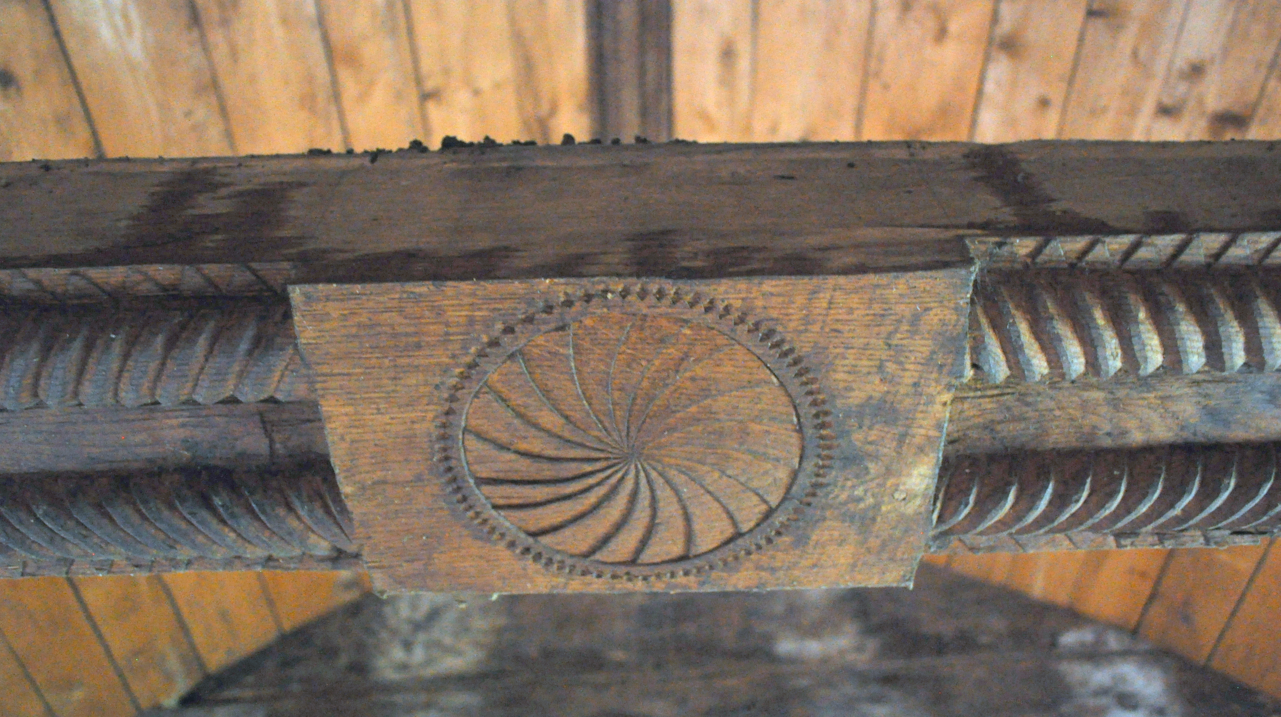 Biserica de lemn „Sfinţii Arhangheli Mihail și Gavriil" din Poarta Sălajului, comuna Românaşi, judeţul Sălaj